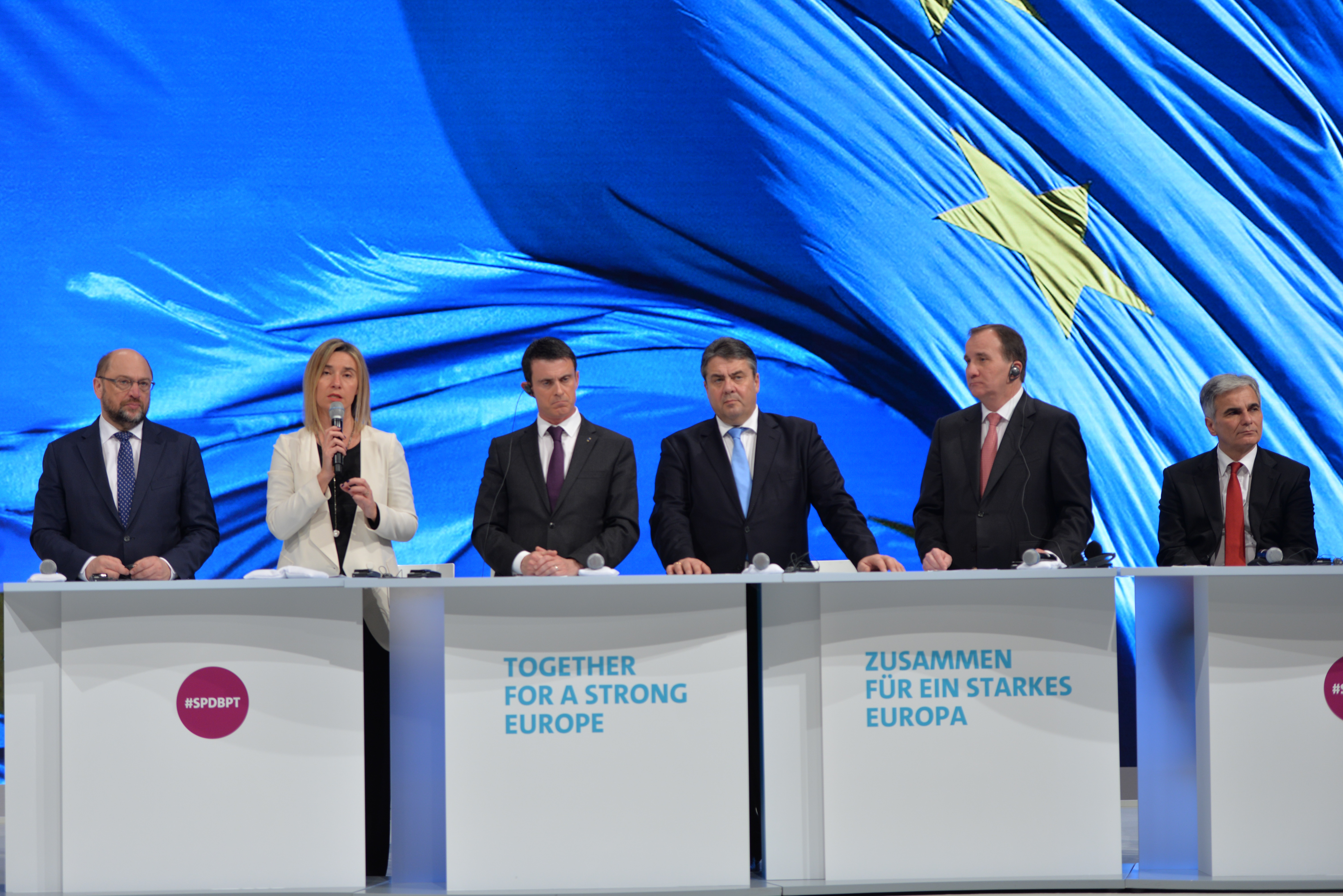 SPD Bundesparteitag 2015 - Gruppenaufnahmen